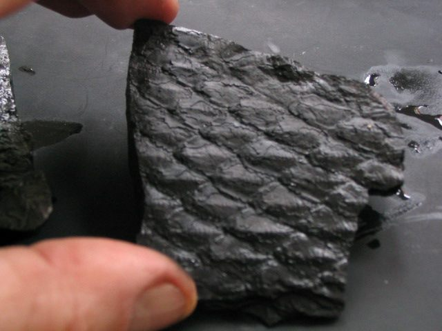 photo de l'auteur - fossile trouvé sur un terril houiller - (Lepidodendron?)